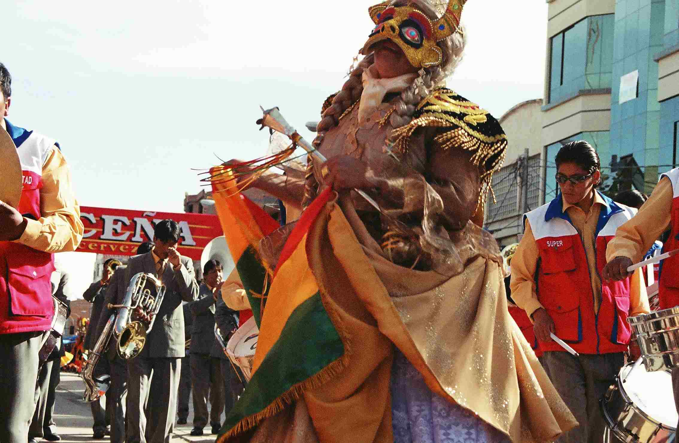 Imagen del Carnaval de Oruro, obtenida durante las celebraciones en el verano del año 2005.